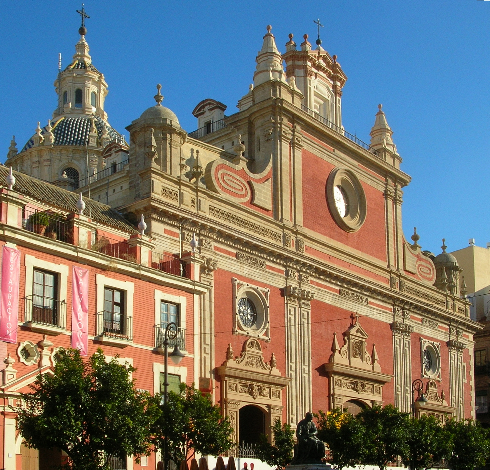 Eglise du Divino Salvador, Séville